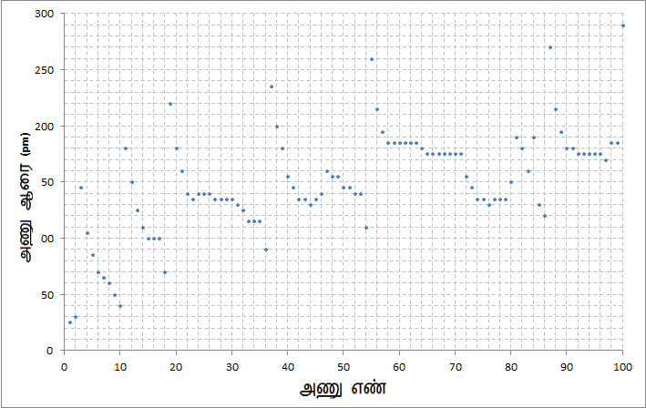 அணு எண்ணுக்கமைய மூலகங்களின் அணு ஆரை அதிகரிக்கும் விதம்